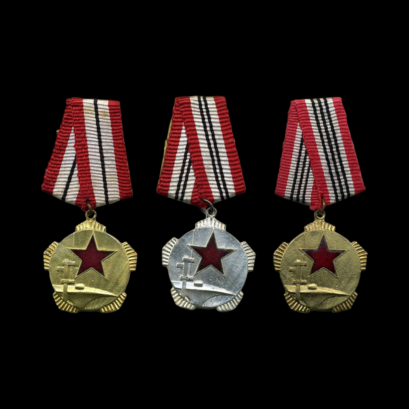 Urdhëri për shërbime të shquara në fushën e mbrojtjes.